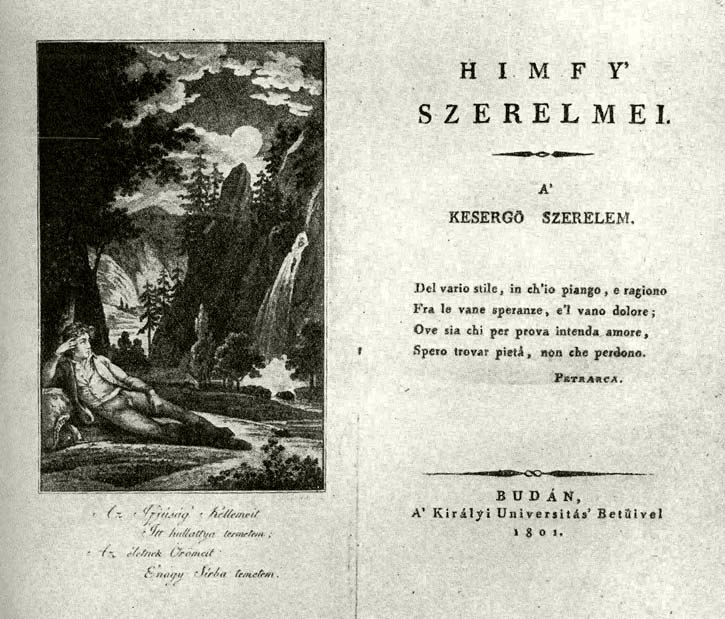 Kisfaludy Sándor: Himfy szerelmei, az első kiadás eredetije